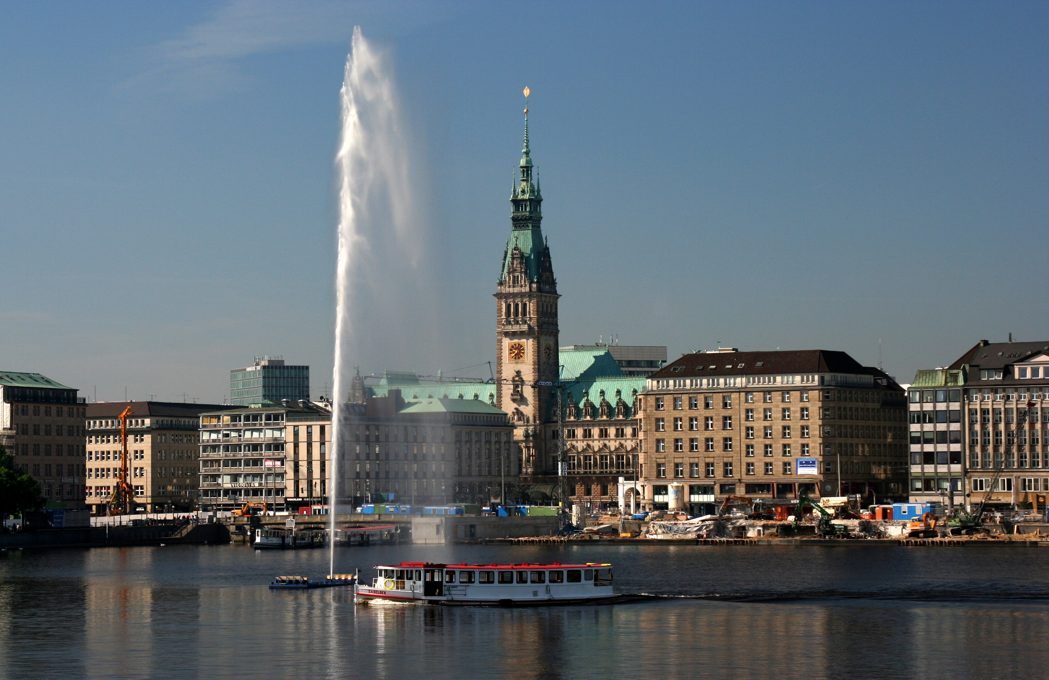 Hamburg 2005-05-26/29 Lukas KURTZ Binnenalster zum Rathaus